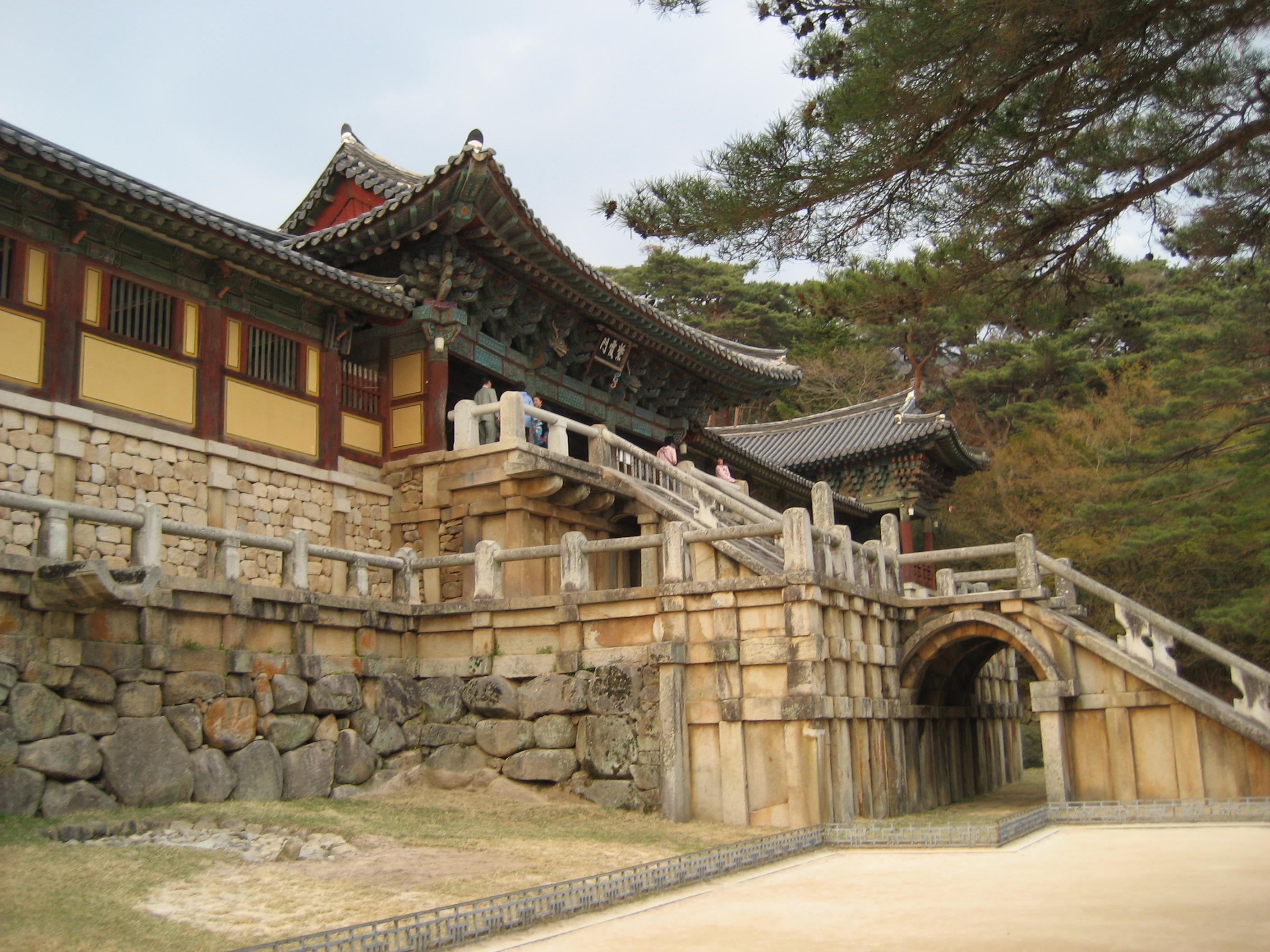 Korea-Gyeongju-Bulguksa